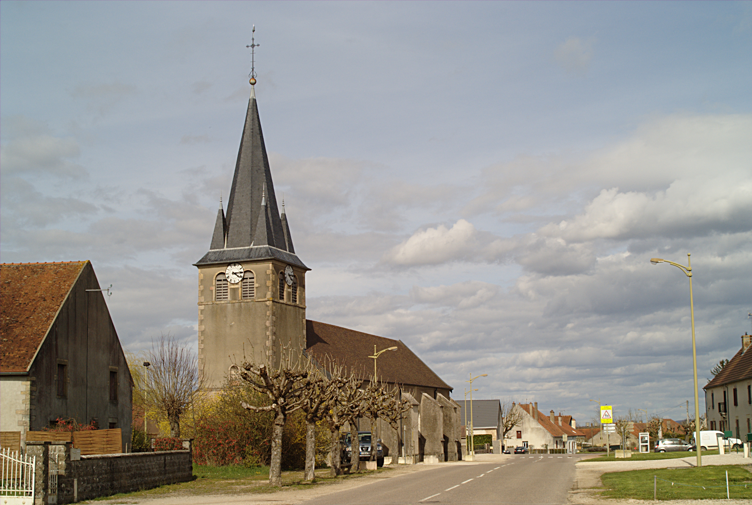 Église Sainte-Marie-Madeleine, Laperrière-sur-Saône (Côte d'Or, Bourgogne, France)